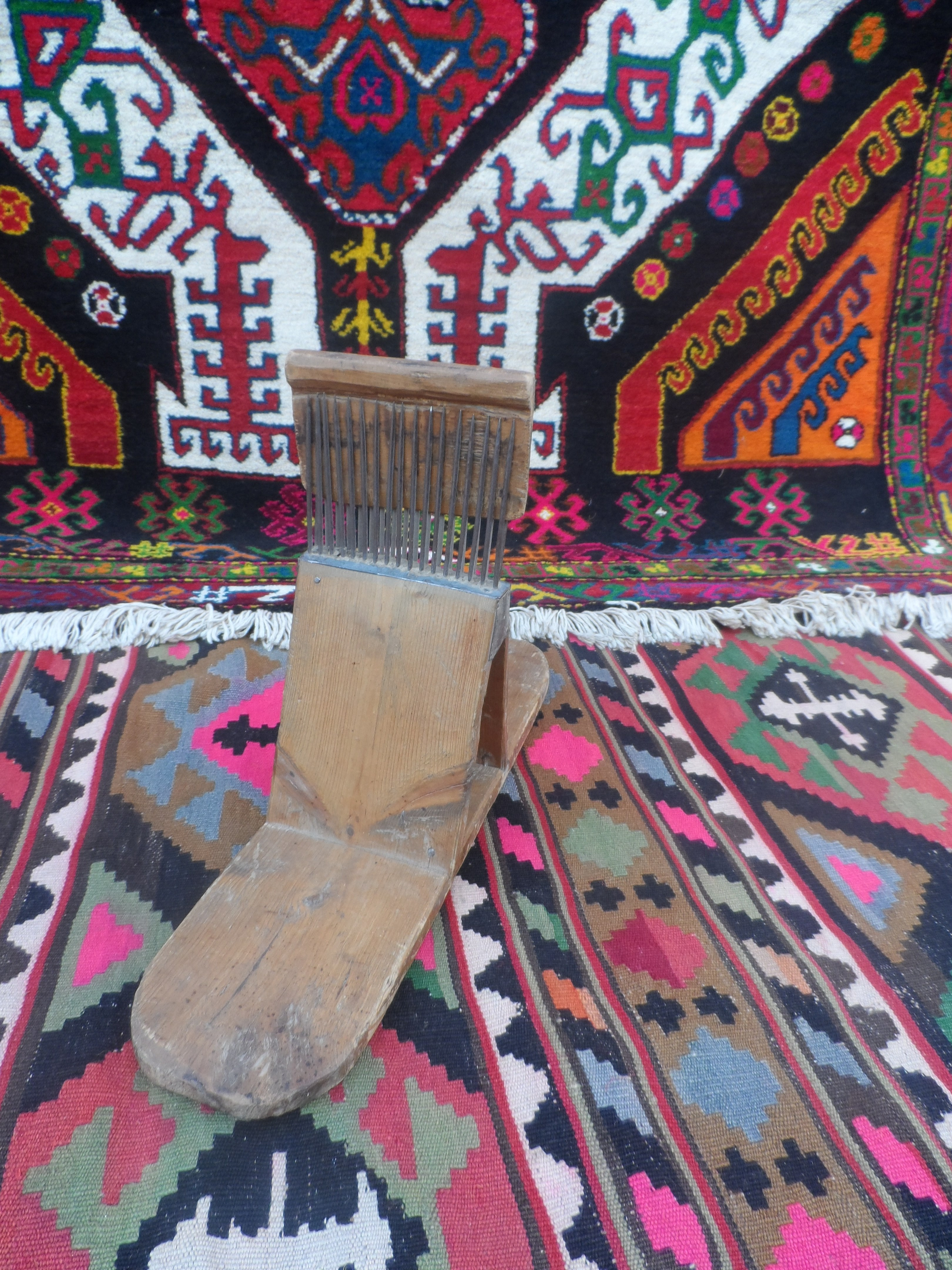 Yun darağı — yunun əyrimilməsini asanlaşdırmaq üçün alət